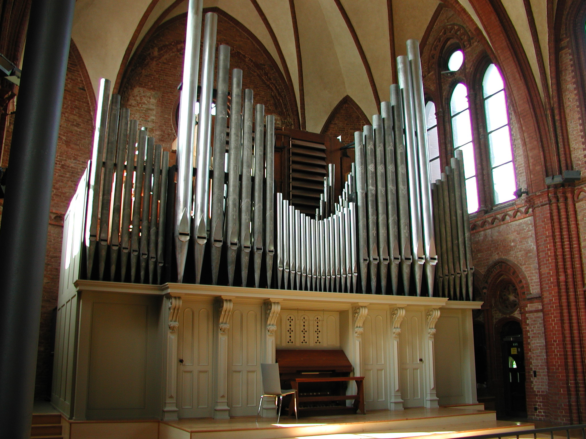 Die moderne Orgel in der Hl.-Kreuz-Kirche, Kreuzberg, Berlin, Deutschland.